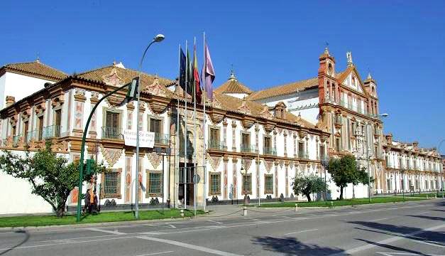 Palacio de la Merced, en Córdoba (España).